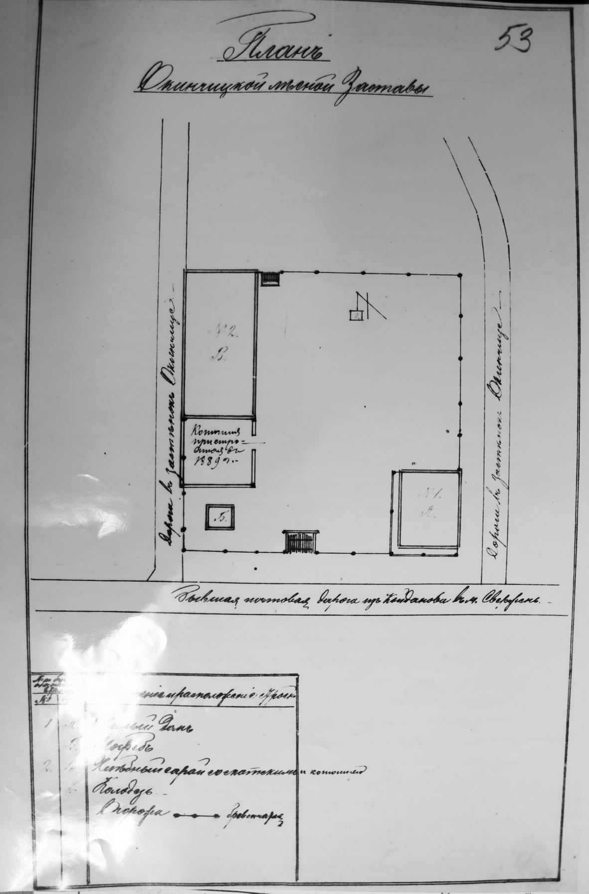 Беларуская (тарашкевіца): Акінчыцы (Akinčycy), плян лесьнічоўкі